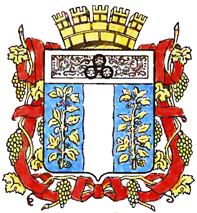 Герб города Самарканда утвержден 14 апреля 1910 года